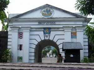 Benteng Victoria adalah benteng peninggalan Portugis dan Belanda yang terletak di jantung Kota Ambon